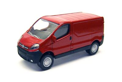 Foto + Bewerking; eigen creatie Zie website